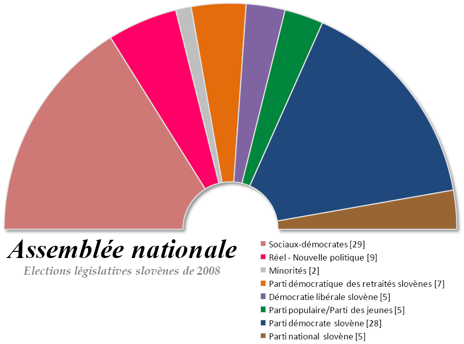 Composition politique de l'Assemblée nationale de Slovénie après les élections législatives de 2008.